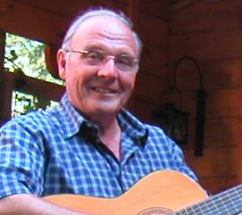 Frans Nieuwenhuis, Dutch singer in Veluws dialect